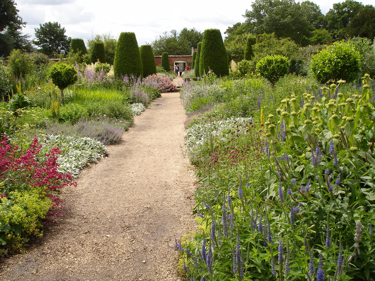 Mottisfont Abbey Gardens